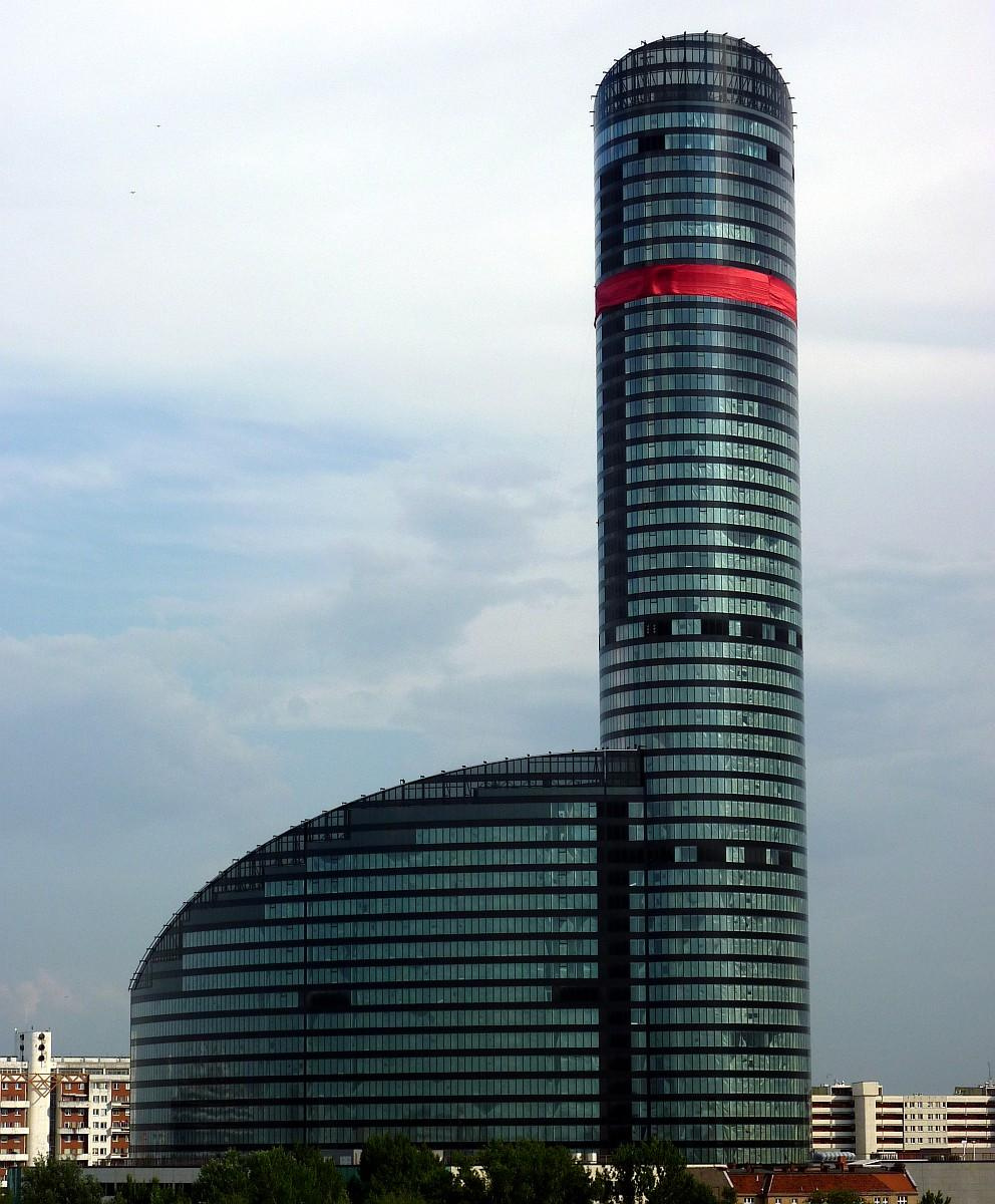 Przepasali ją czerwoną wstążką?...